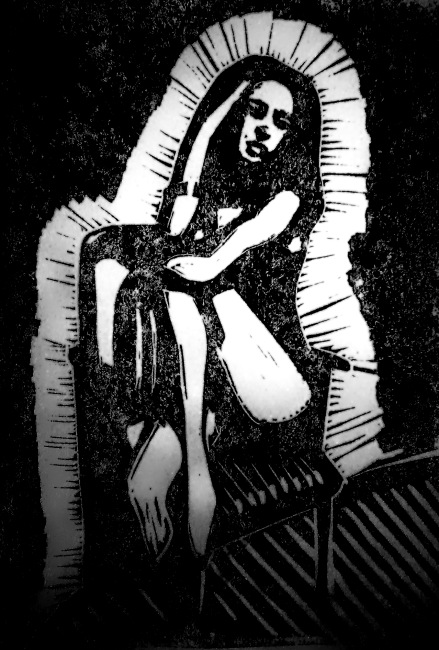 Девушка на стуле